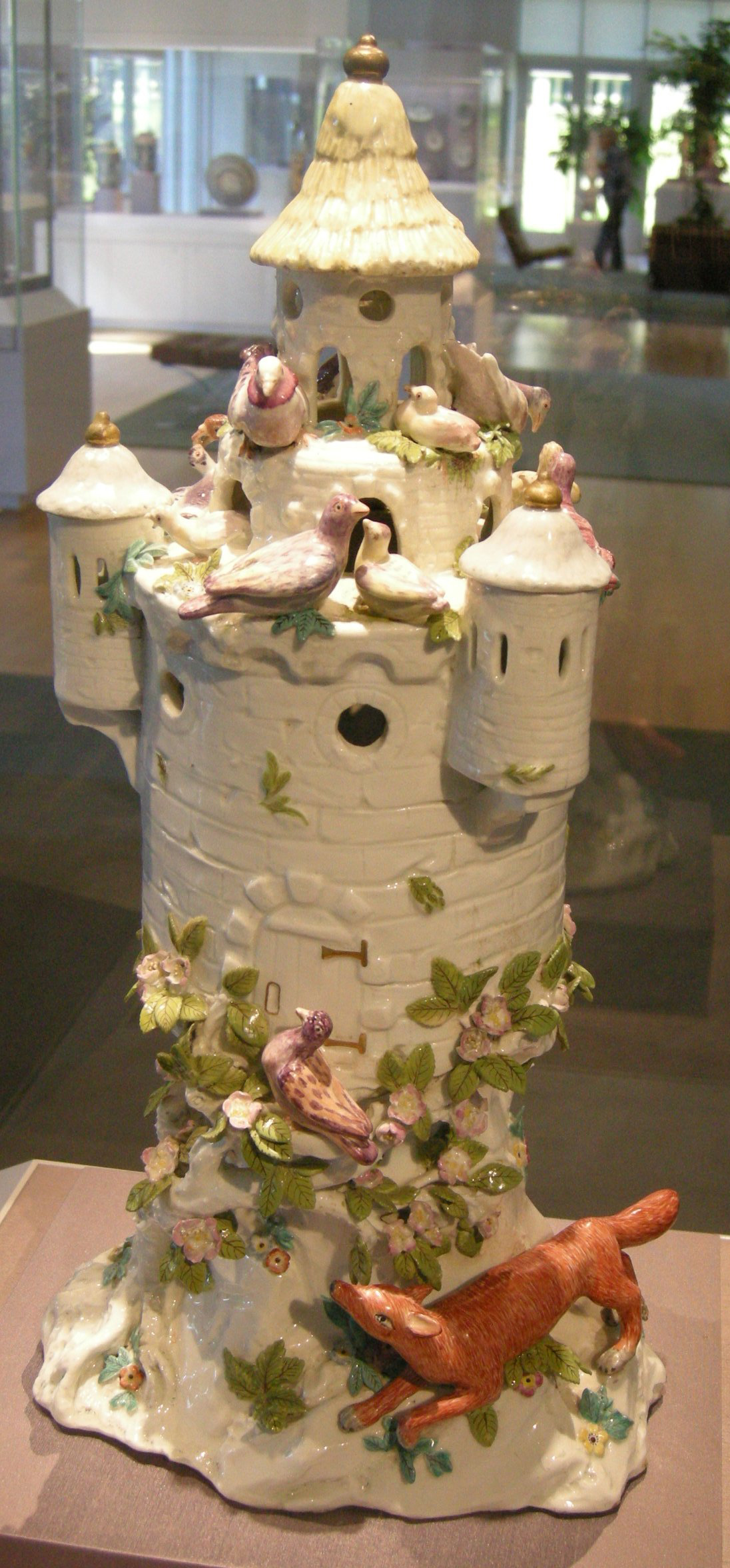 Chelsea porcelaine, colombaia, 1755-56 circa